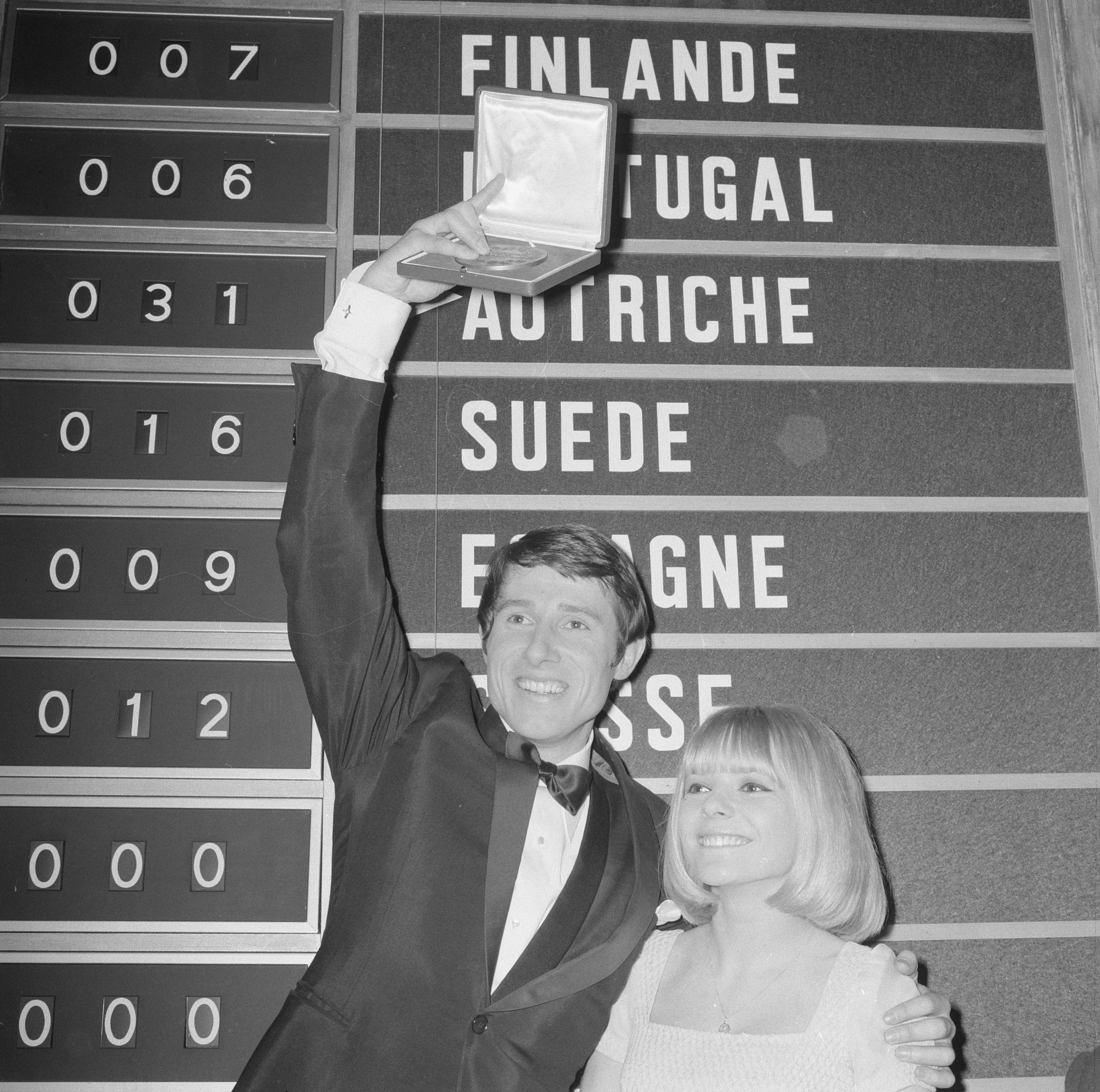 Collectie / Archief : Fotocollectie Anefo Reportage / Serie : [ onbekend ] Beschrijving : Eurovisie Songfestival 1966 te Luxemburg. De winnaar Udo Jürgens met de winnares van 1965 France Gall Datum : 6 maart 1966 Locatie : Luxemburg Trefwoorden : artiesten, muziek, songfestivals, zangeressen, zangers Persoonsnaam : Gall, France, Jürgens, Udo Fotograaf : Dam, Bob van / Anefo Auteursrechthebbende : Nationaal Archief Materiaalsoort : Negatief (zwart/wit) Nummer archiefinventaris : bekijk toegang 2.24.01.03 Bestanddeelnummer : 918-9214